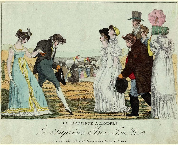 Publié dans Le Suprême Bon Ton n°12 - La Parisienne à Londres